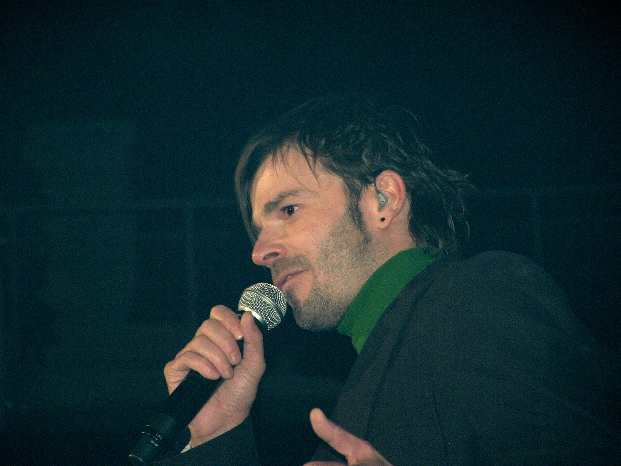 Geert Hunaerts tijdens Steracteur Sterartiest Live on Stage op 1 februari 2008 in de Lotto Arena Antwerpen.